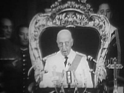 Imagen del general Franco dirigiéndose a las Cortes, probablemente en 1969.